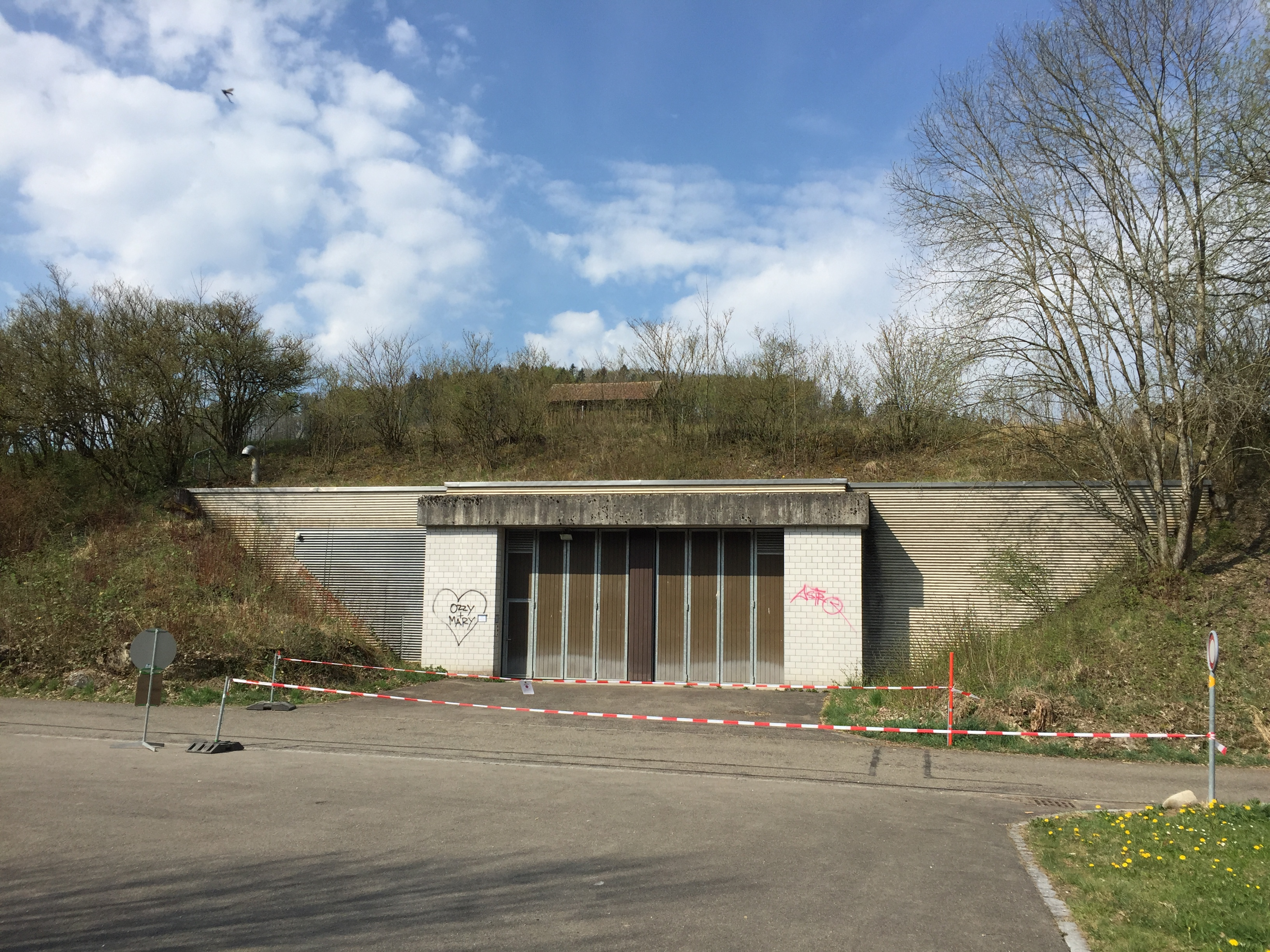 ehemalige militärische Sauerstofffabrik, Madetswil, Russikon ZH, Schweiz: Wegen der Corona-Pandemie abgesperrter Parkplatz für Ausflügler in Madetswil ZH. Die vorübergehende Einschränkung der persönlichen Freiheit der Menschen ist weniger gravierend als das Risiko einer schweren oder tödlichen Erkrankung: Das verpflichtet den Staat zum Handeln, NZZ 1. April 2020.